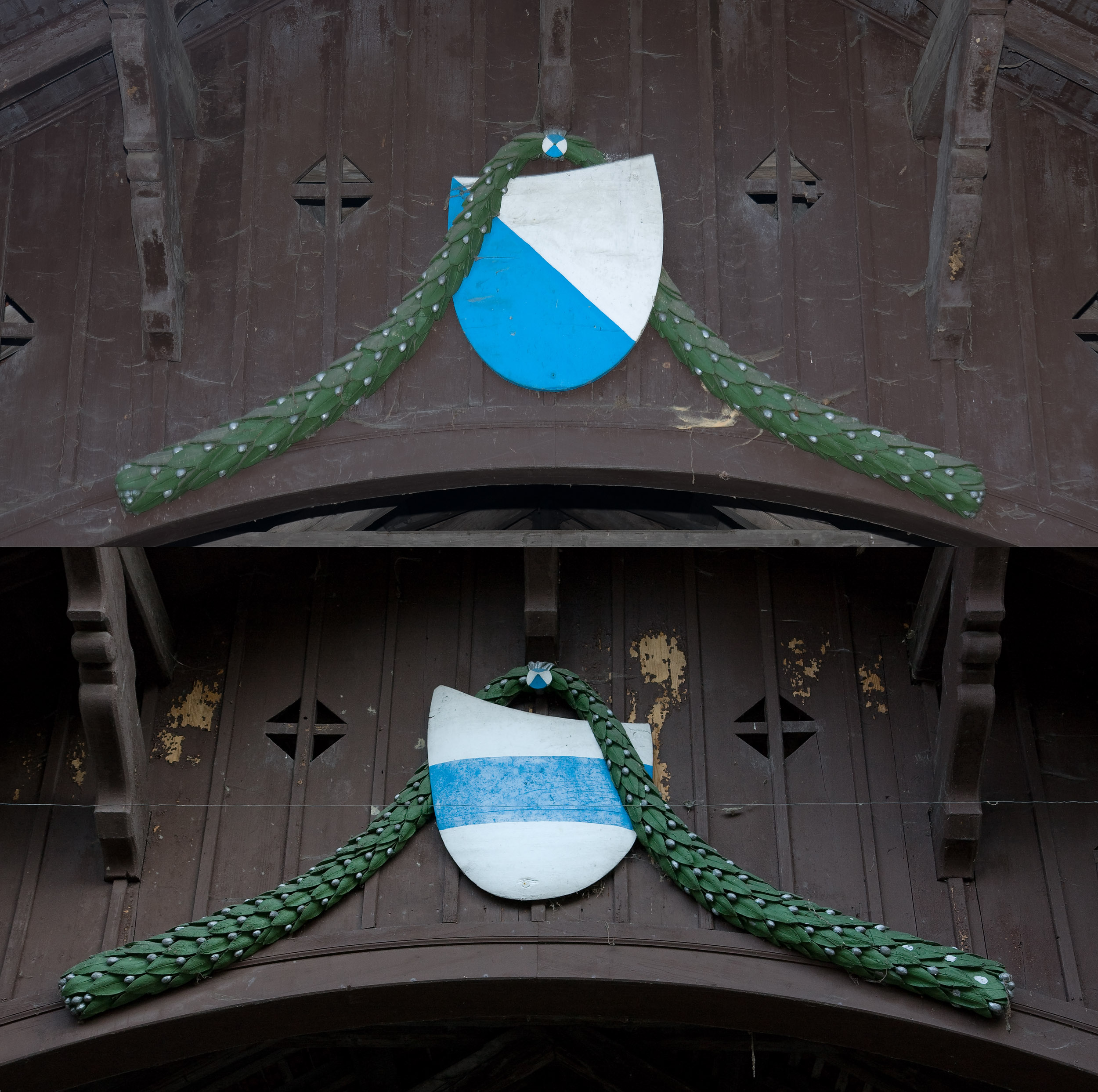 Die «Babenwaag» in Sihlbrugg verbindet Zug mit Zürich. Im Bild die Wappen am Brückenkopf in Zug (Neuheim) und Zürich (Hirzel).